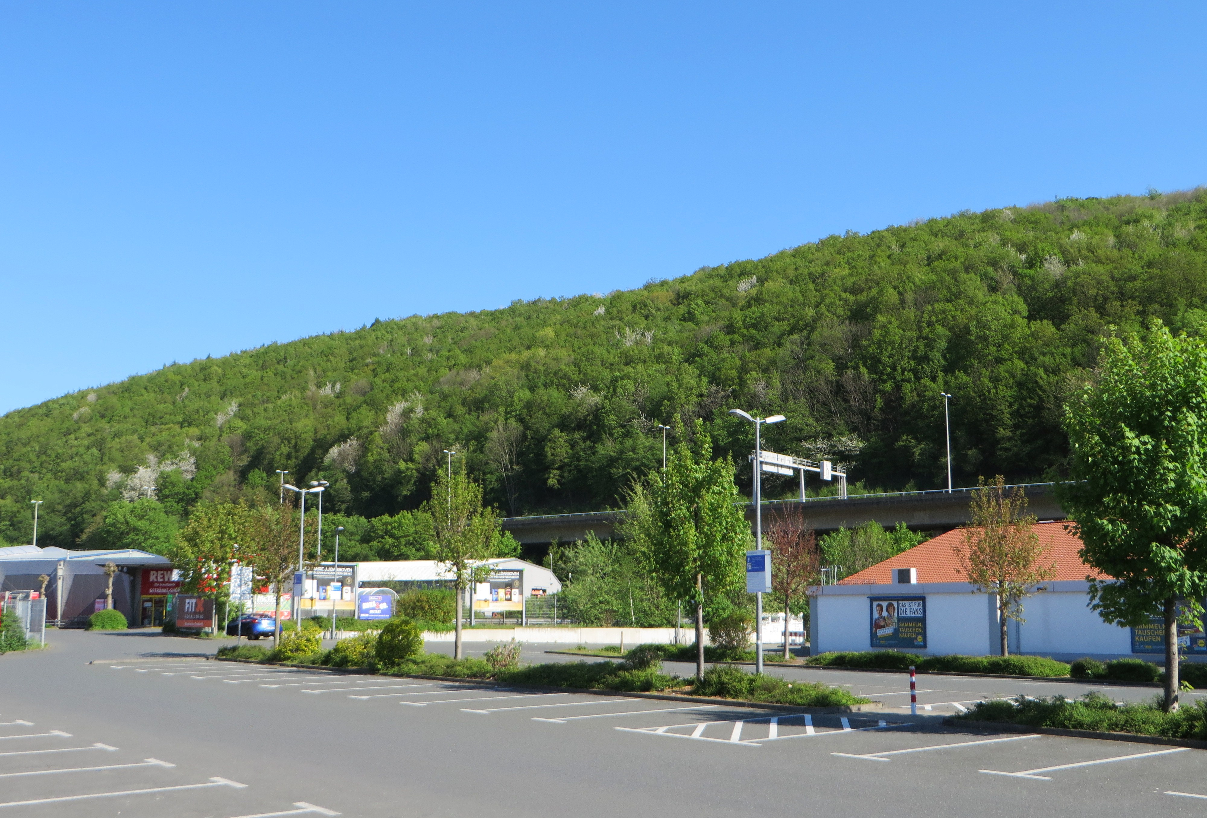 Naturschutzgebiet Hardt (HA-016) in Hagen, oberhalb der Volmetalstraße (B 54). Blick vom Parkplatz des Einkaufszentrums Eilpe auf das Schutzgebiet. Es umfaßt einen Laubholzbestand auf einem südwestexponierten Hang, der sich überwiegend aus jüngeren Eichen und Hainbuchen zusammensetzt. Am Fuß des Steilhanges kommt es durch den Hanganschnitt der hier aufgeständerten Volmetalstraße zur Ausbildung von Trockenrasengesellschaften. Im Osten wird das Gebiet durch zwei, aus der Nutzung genommene Kalksteinbrüche abgeschlossen.